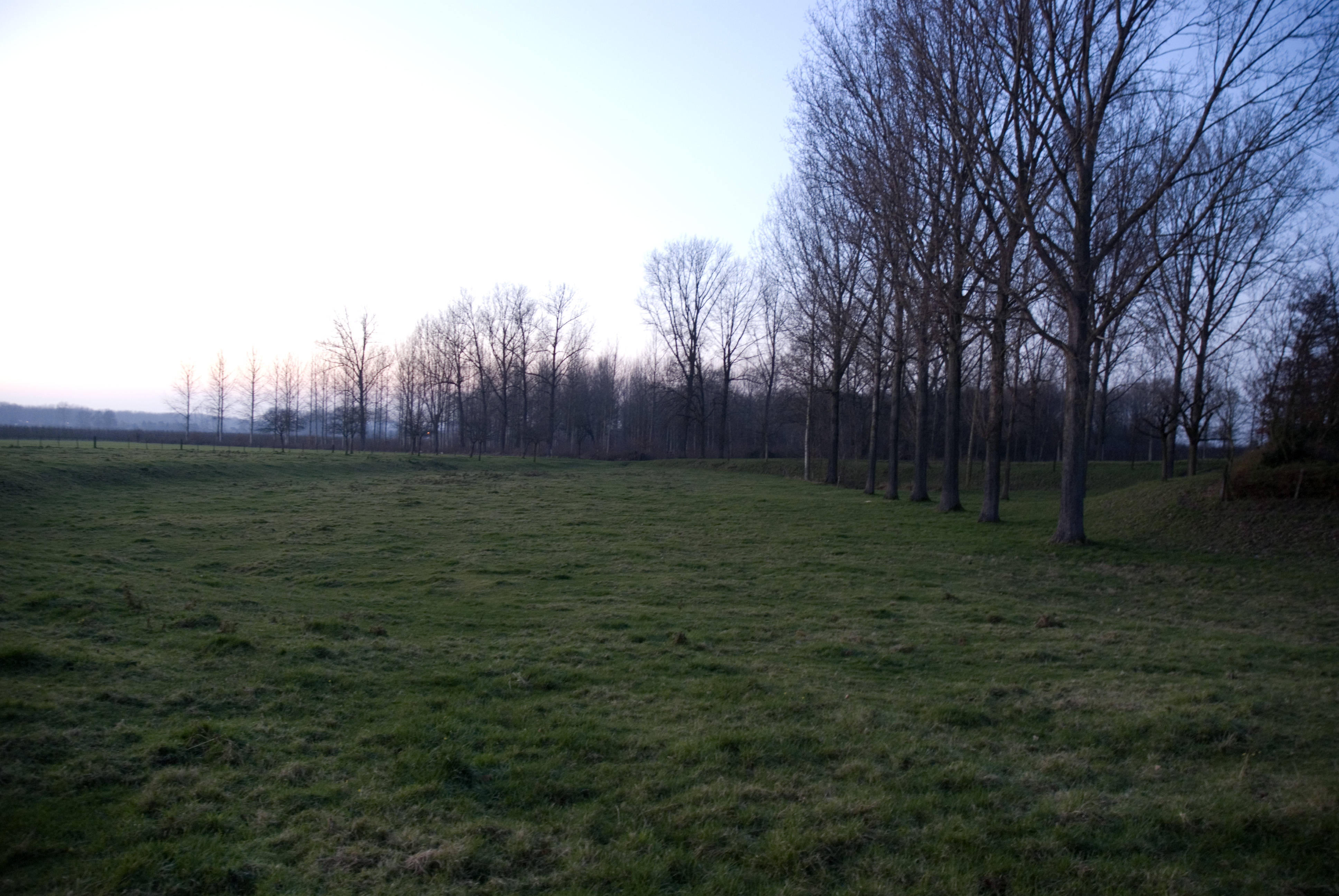 De Bonderkuil in Wellen, België waar 19 bokkenrijders werden terechtgesteld